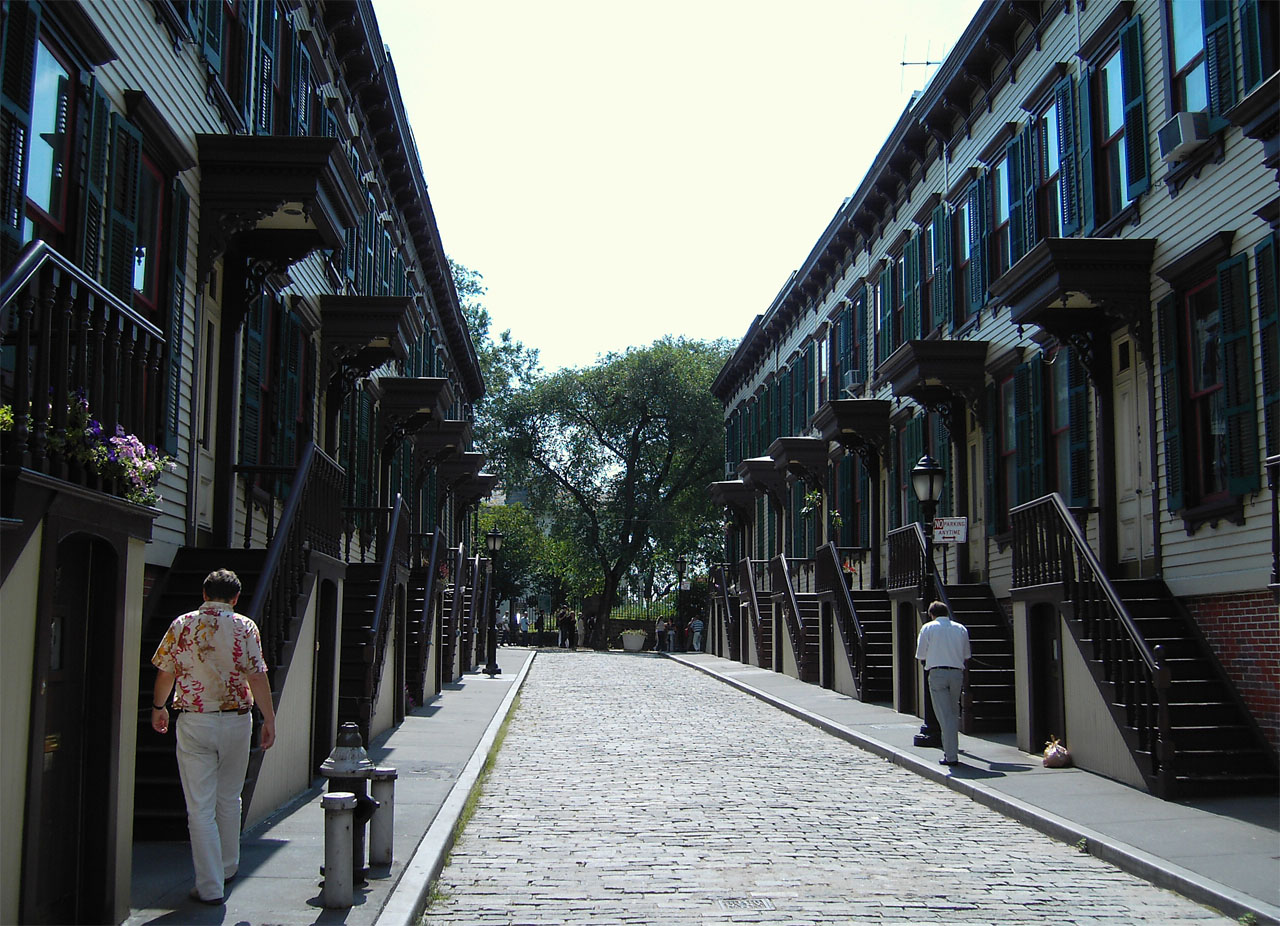 Alte Wohnhäuser an der Sylvan Terrace im Jumel Terrace Historic District des Stadtviertels Washington Heights (New York City).